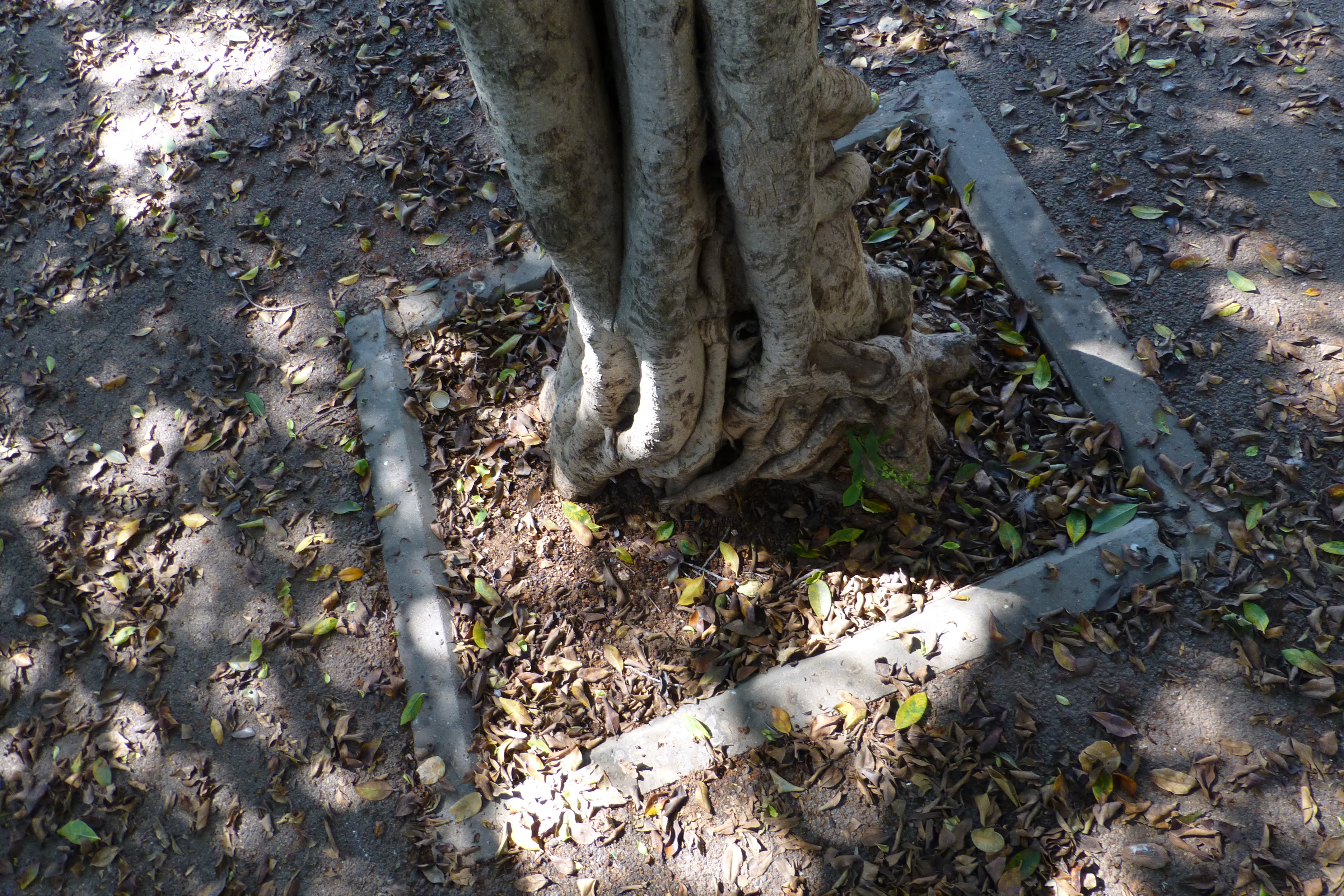 גן אלנבי - רח' יפה נוף 120, מרכז הכרמל, חיפה